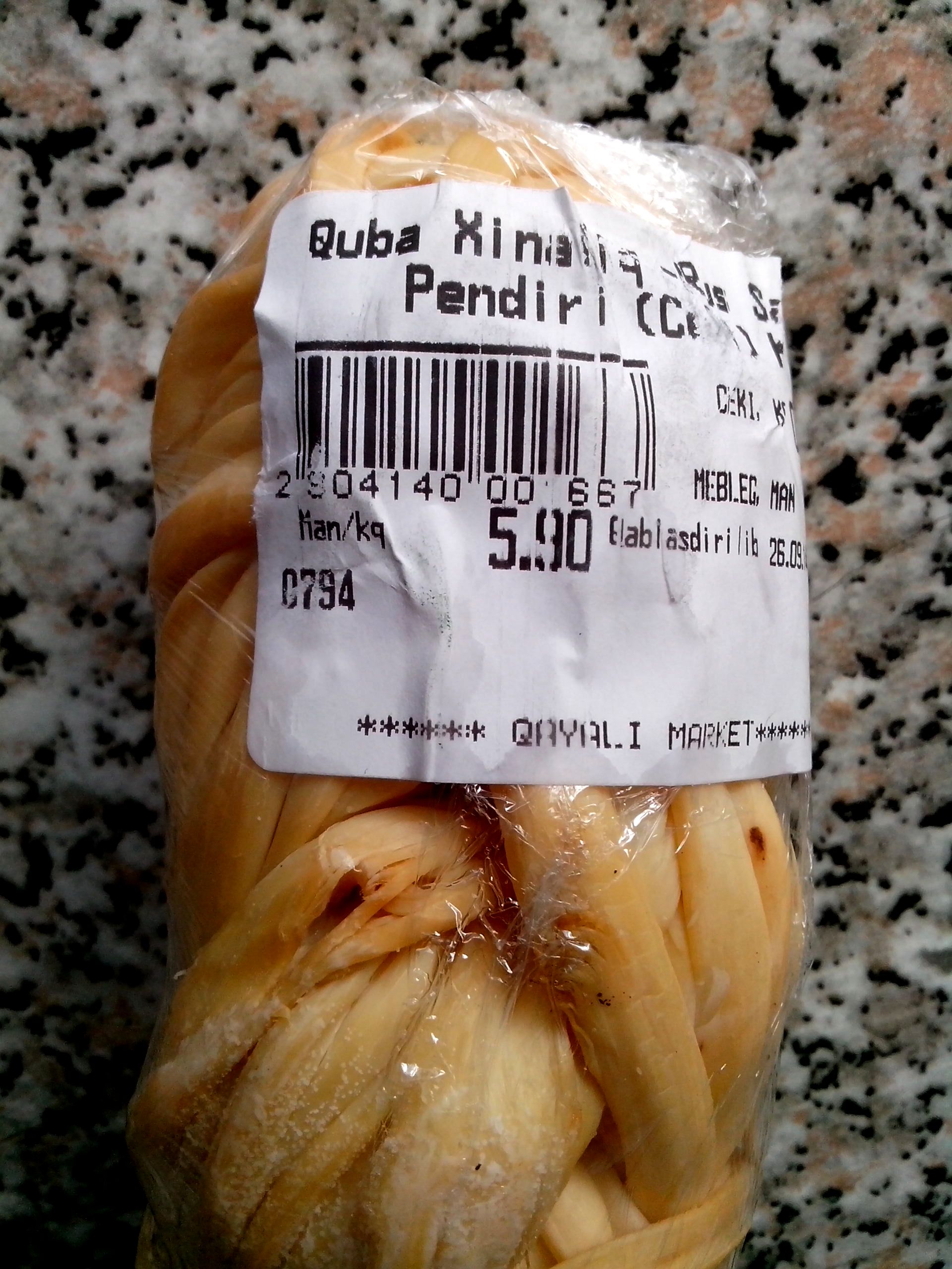 Saçaqlı Xınalıq pendiri